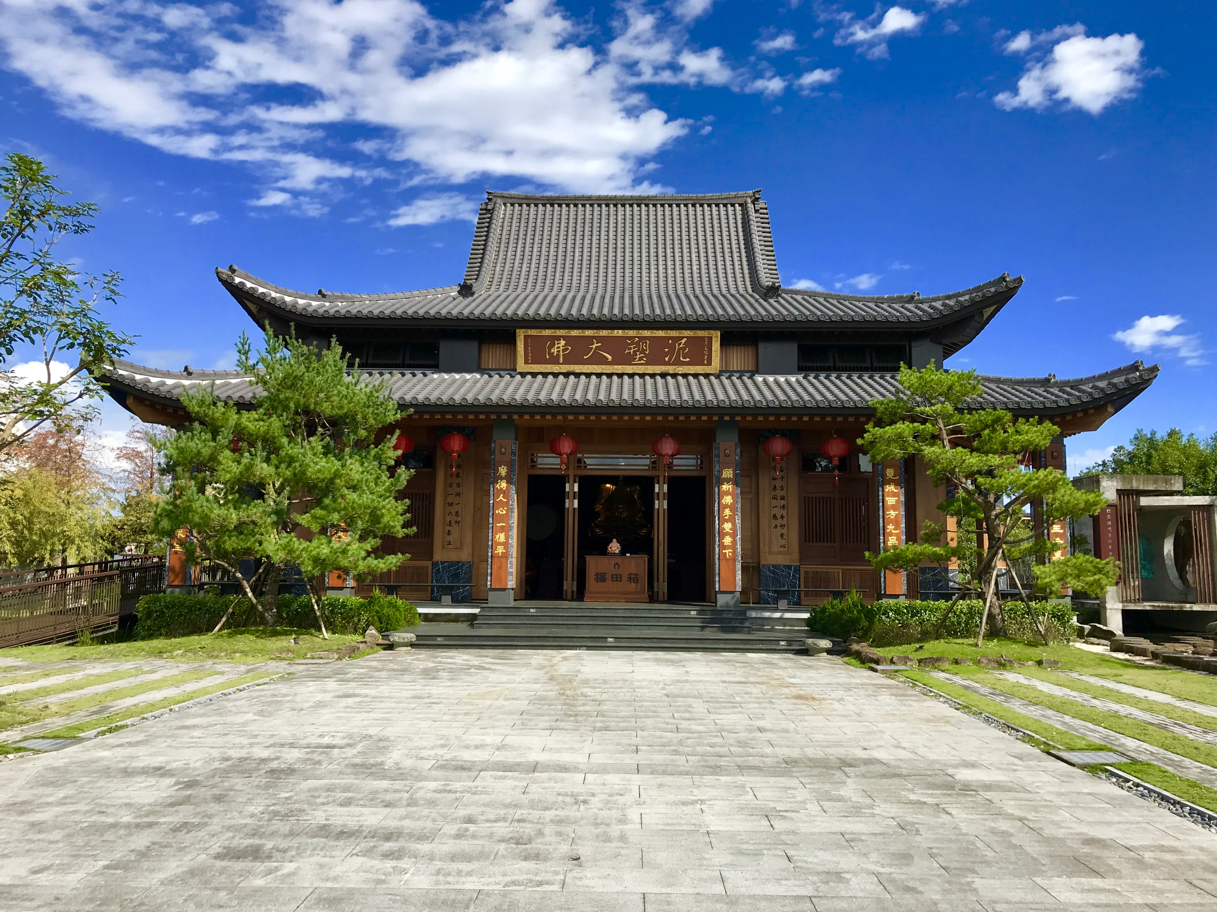 北后寺大殿正面照